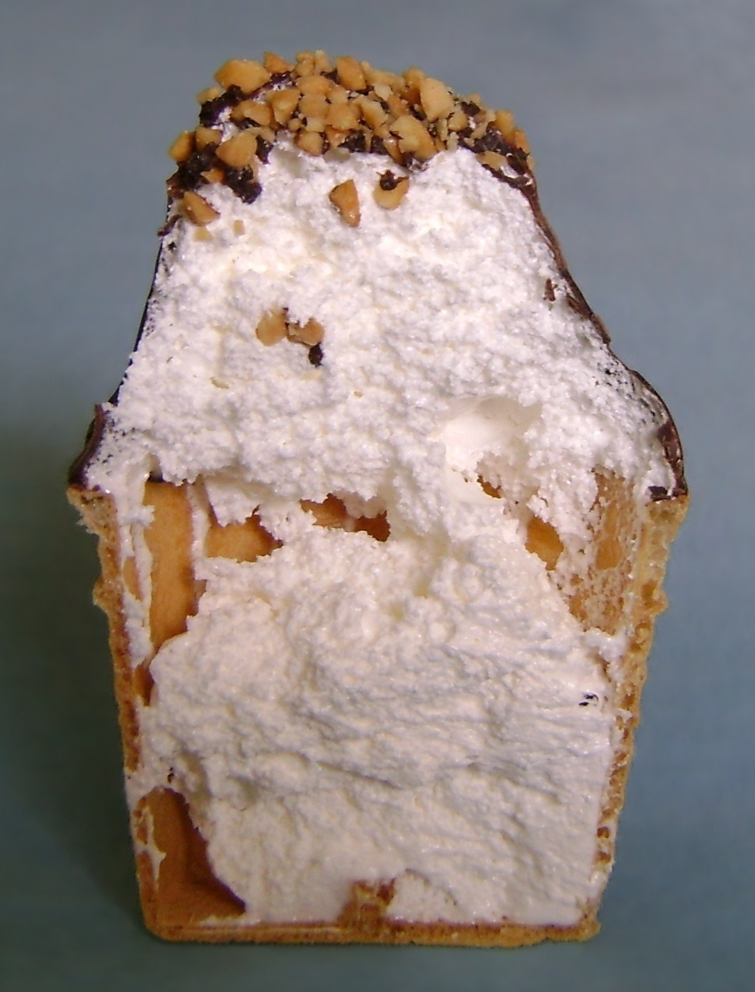 Ciepły lód po przekrojeniu na pół. Zobacz też zdjęcie tego samego loda w całości: Warm ice cream.JPG.